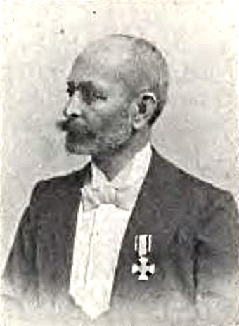 Oberbürgermeister Henryk Engel